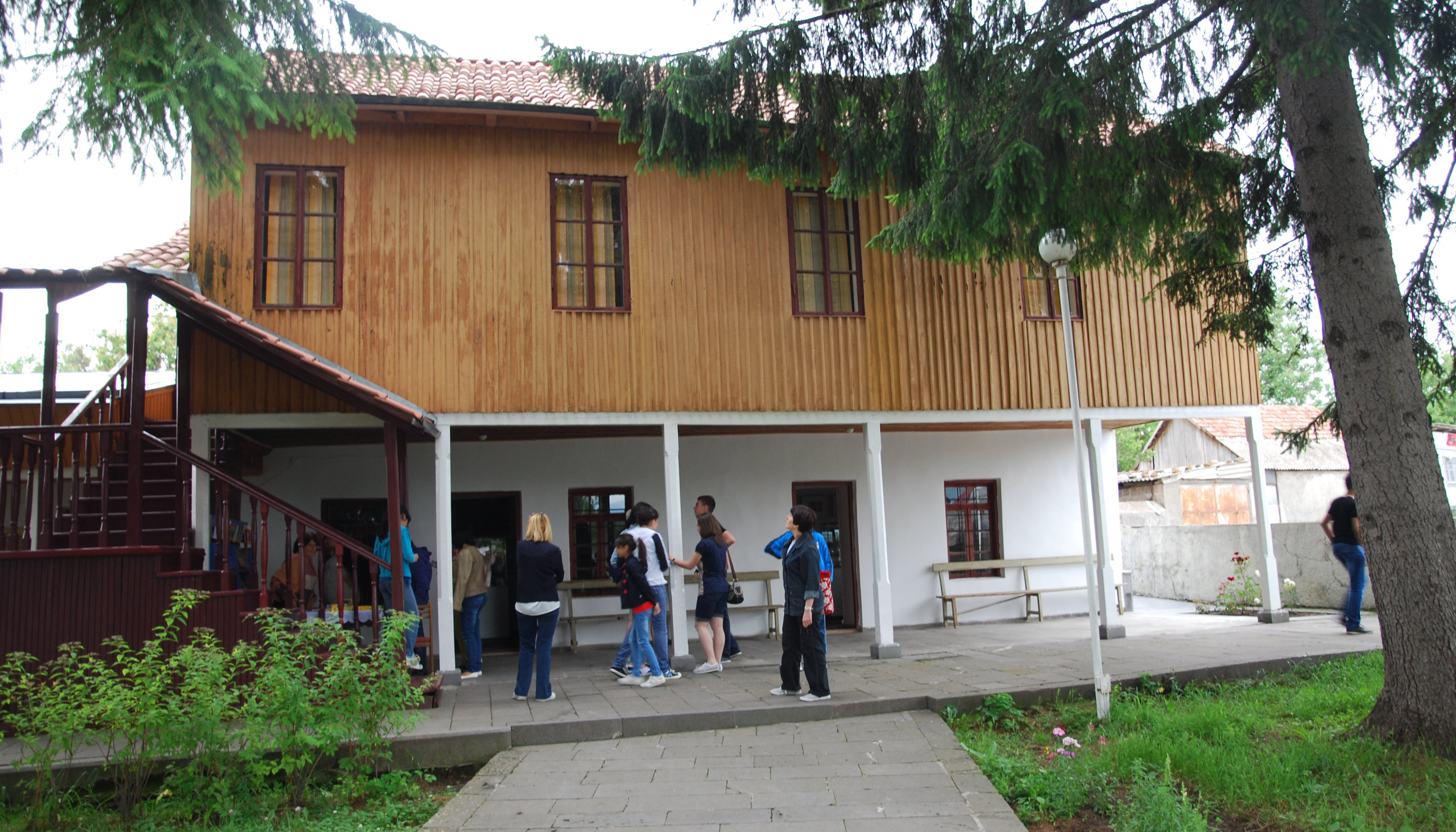 Дом-музей Ованеса Туманяна в селе Дсех (Армения).